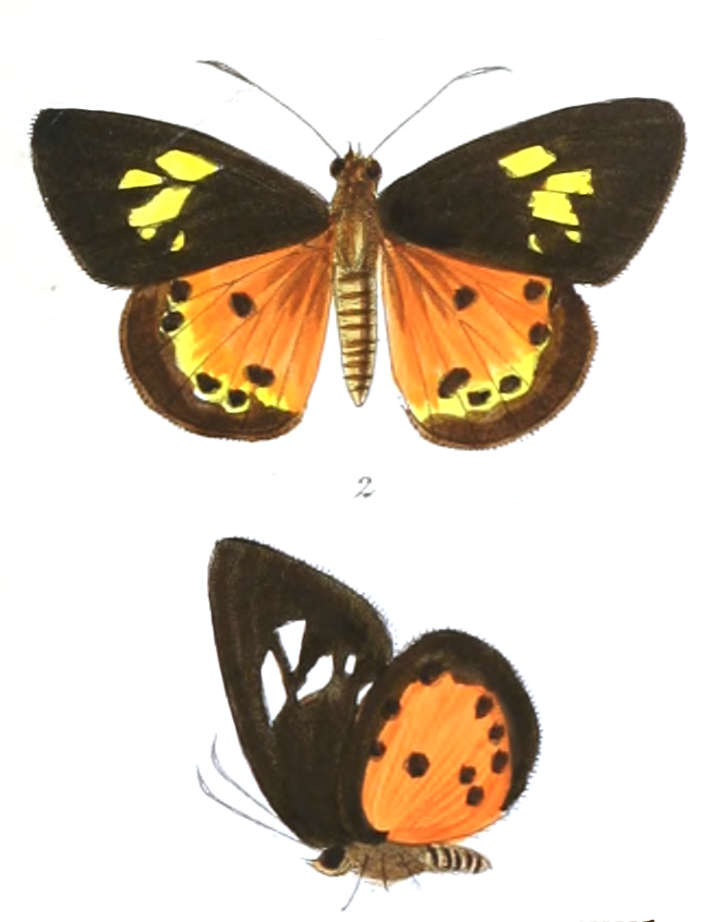 Tagiades pinwilli (male)